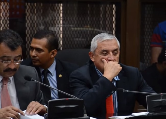 Guatemala vivió un día histórico desde horas de la madrugada cuando se dio a conocer la renuncia de Otto Pérez Molina a la presidencia. Horas después de que el Ministerio Público solicitara la orden de captura del exmandatario